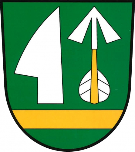 znak, Horní Slatina, okres Jindřichův Hradec